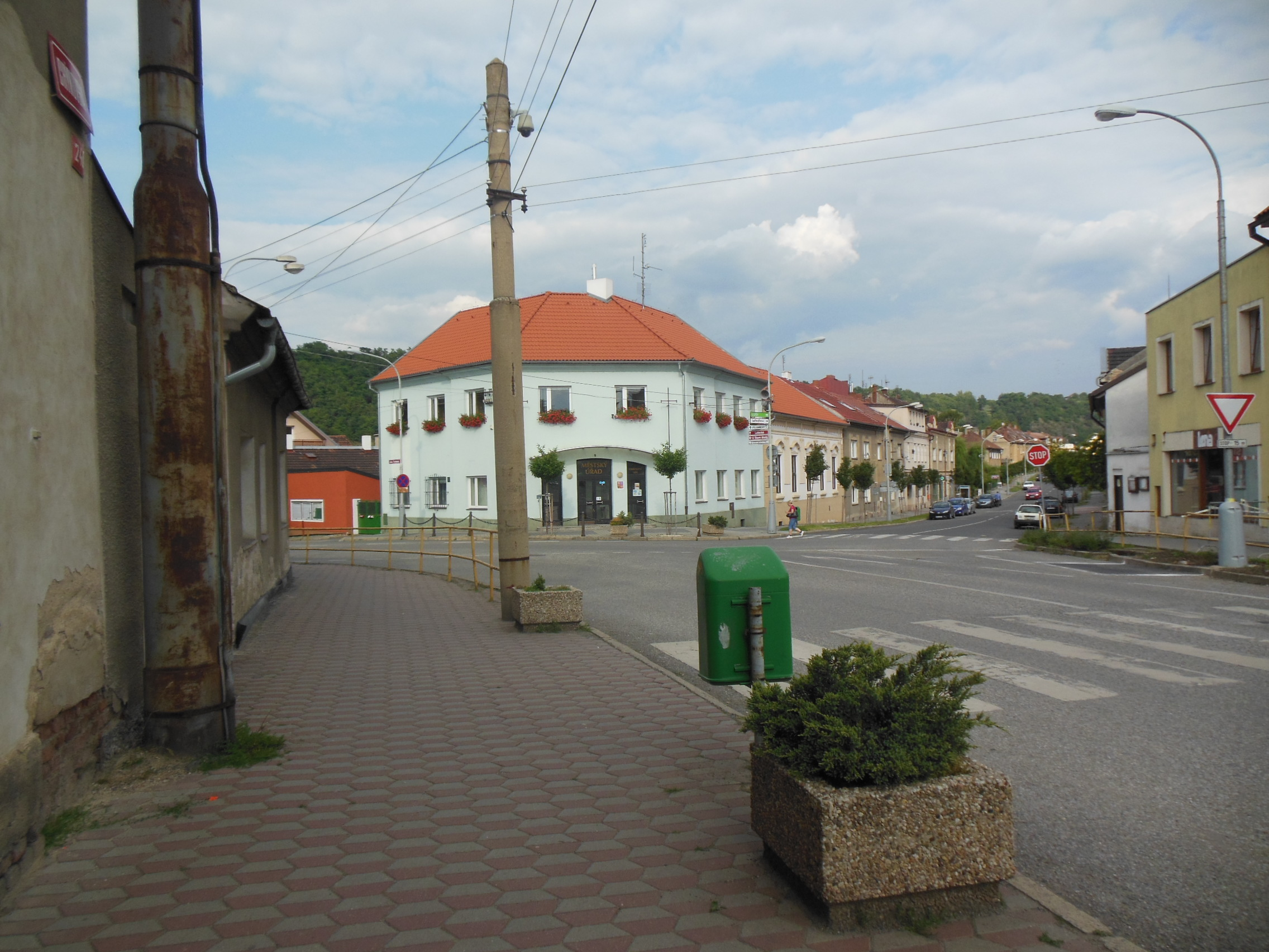 Náměstí Svobody v Libčicích nad Vltavou (okr. Praha-západ).